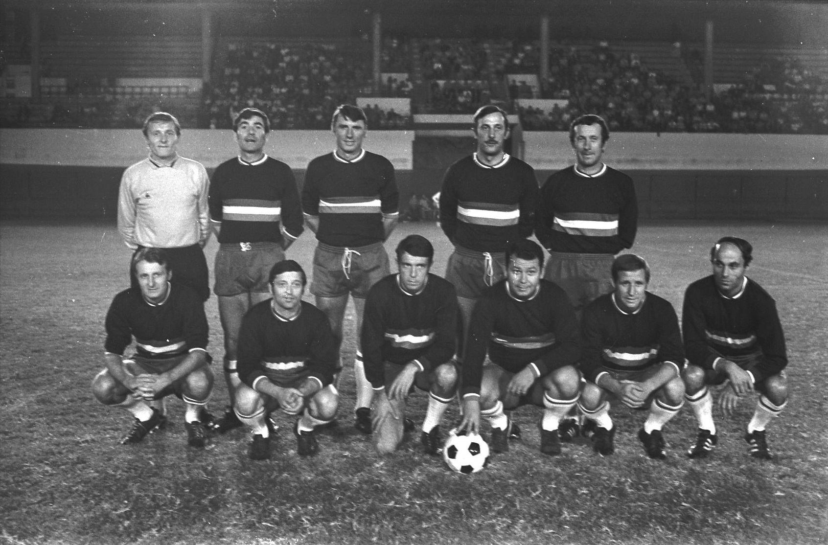 Stadium municipal de Toulouse, 1bis allées Gabriel-Biénès. 22 Septembre 1970. Vue des anciens joueurs de la Coupe du Monde 1958 en Suède et des anciens du Toulouse Football Club.